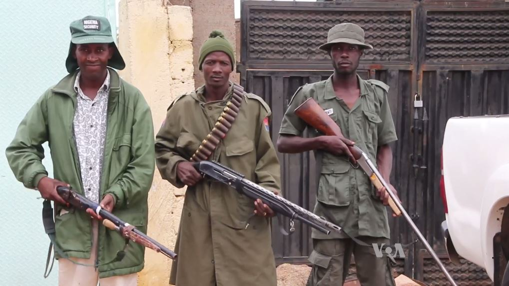 Membres des milices d'autodéfense CJTF à Michika, le 14 juin 2016.